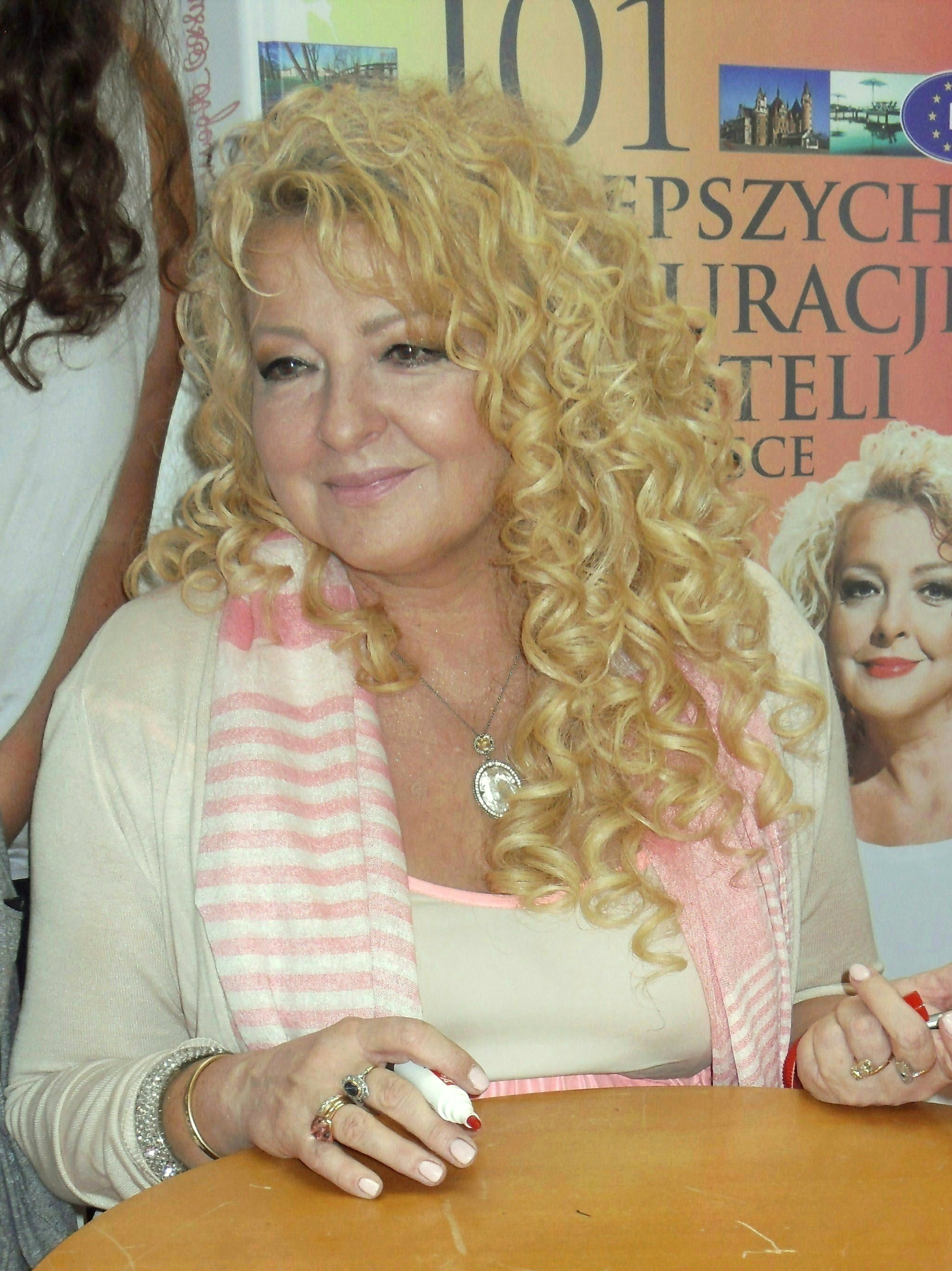 Magda Gessler, restauratorka.